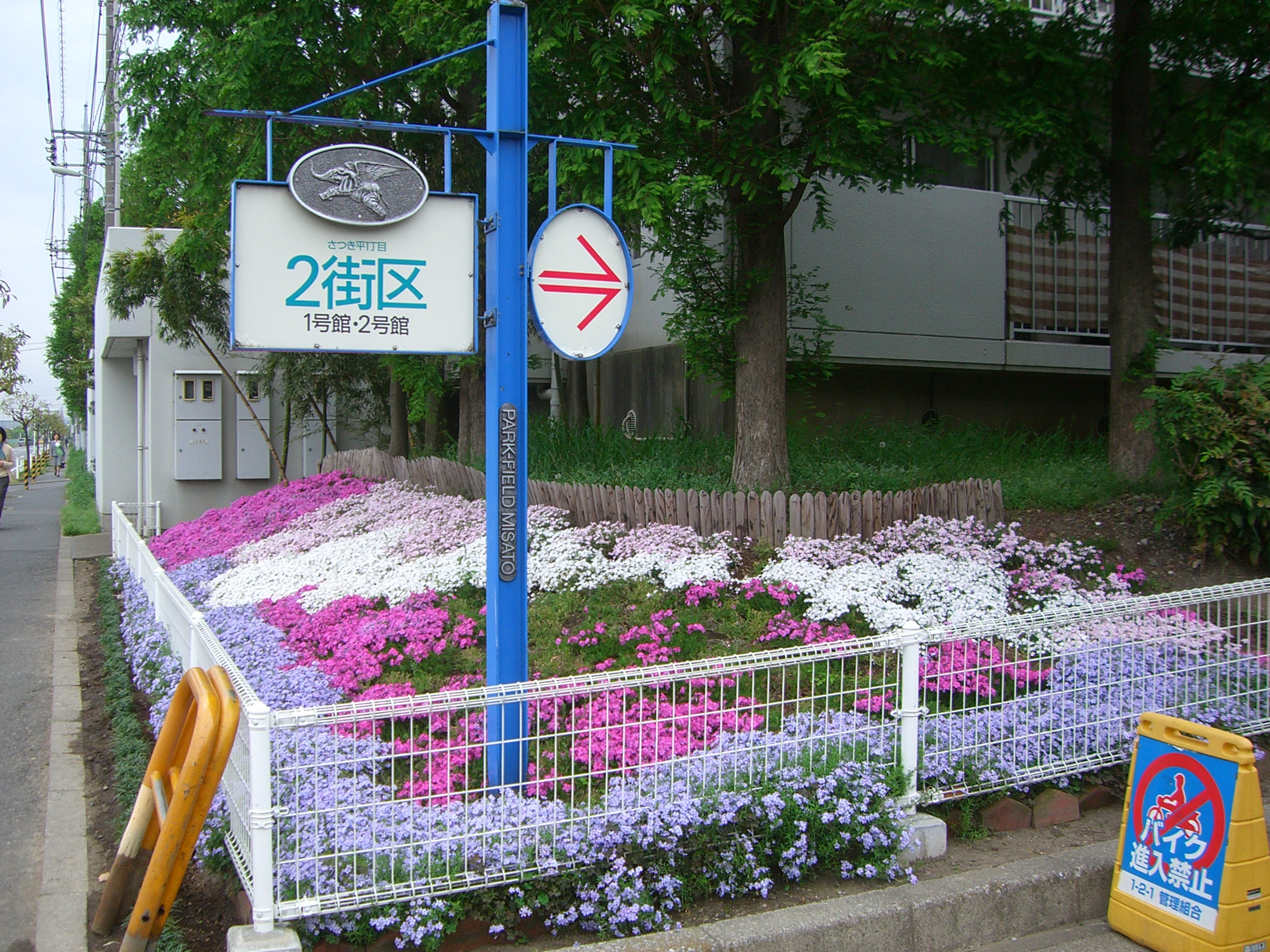 さつき平団地１－２－１東側斜面の芝桜